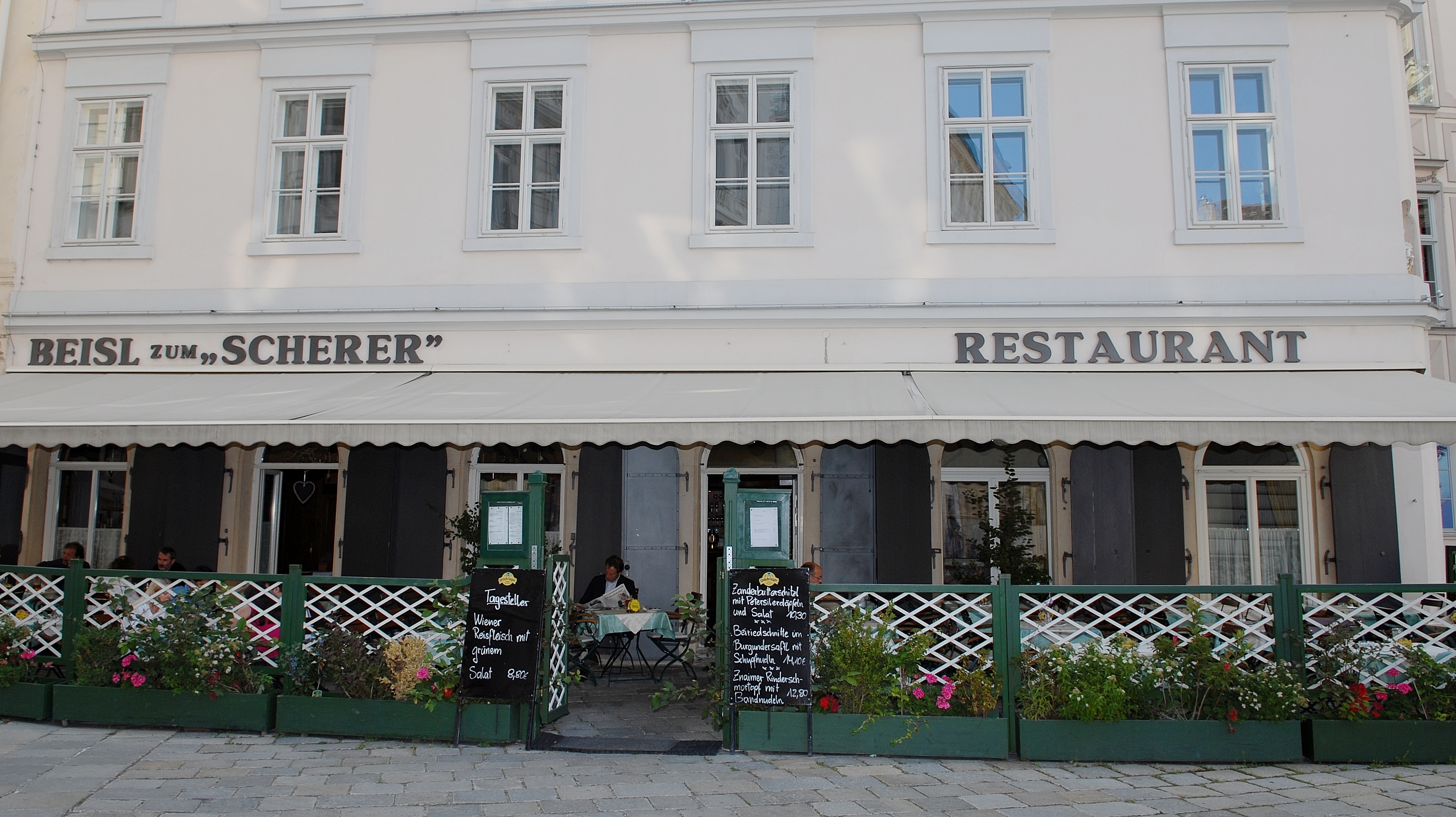 Beisl zum Scherer, 1010 Wien, Judenplatz 10